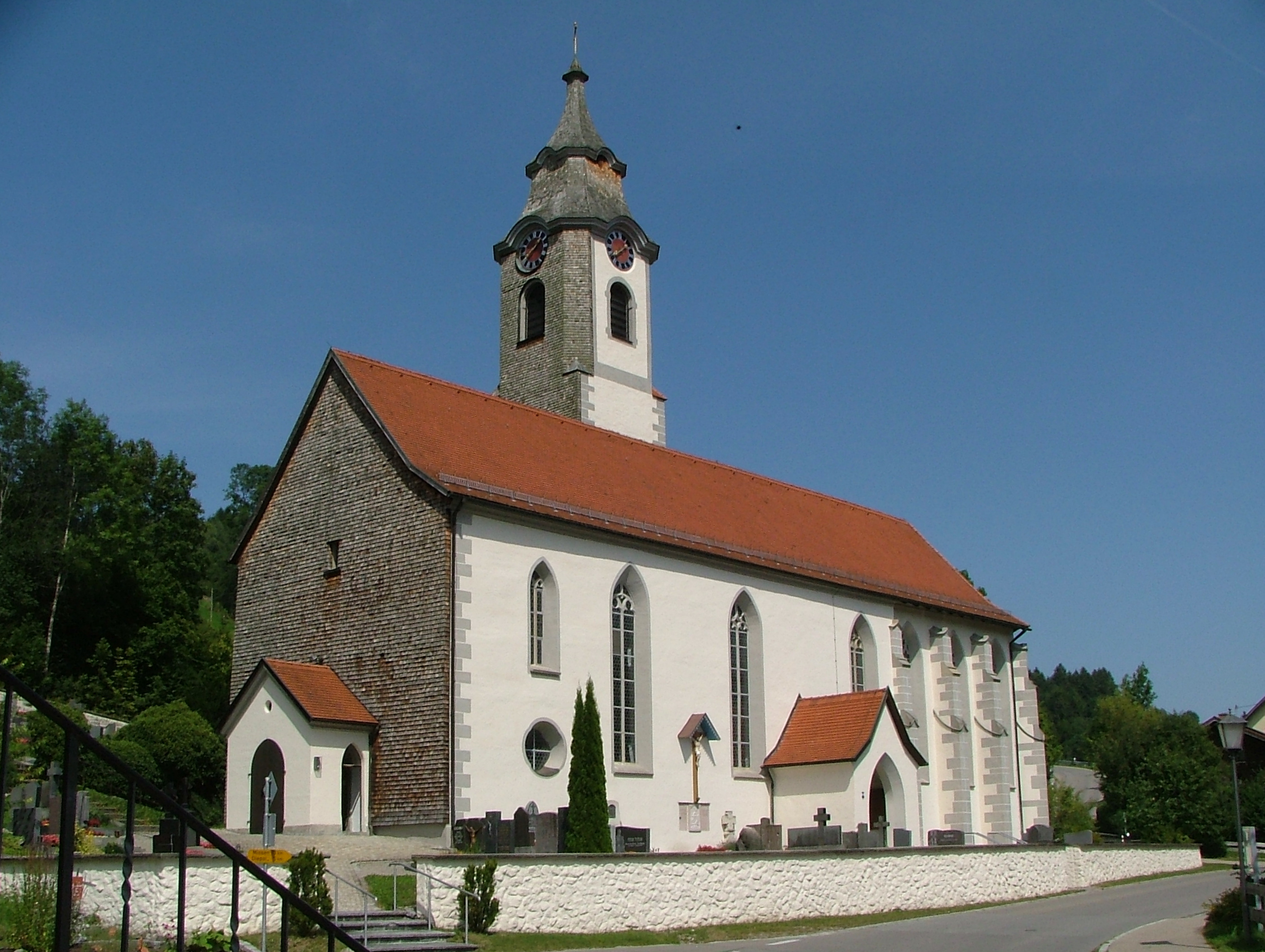 Niedersonthofen